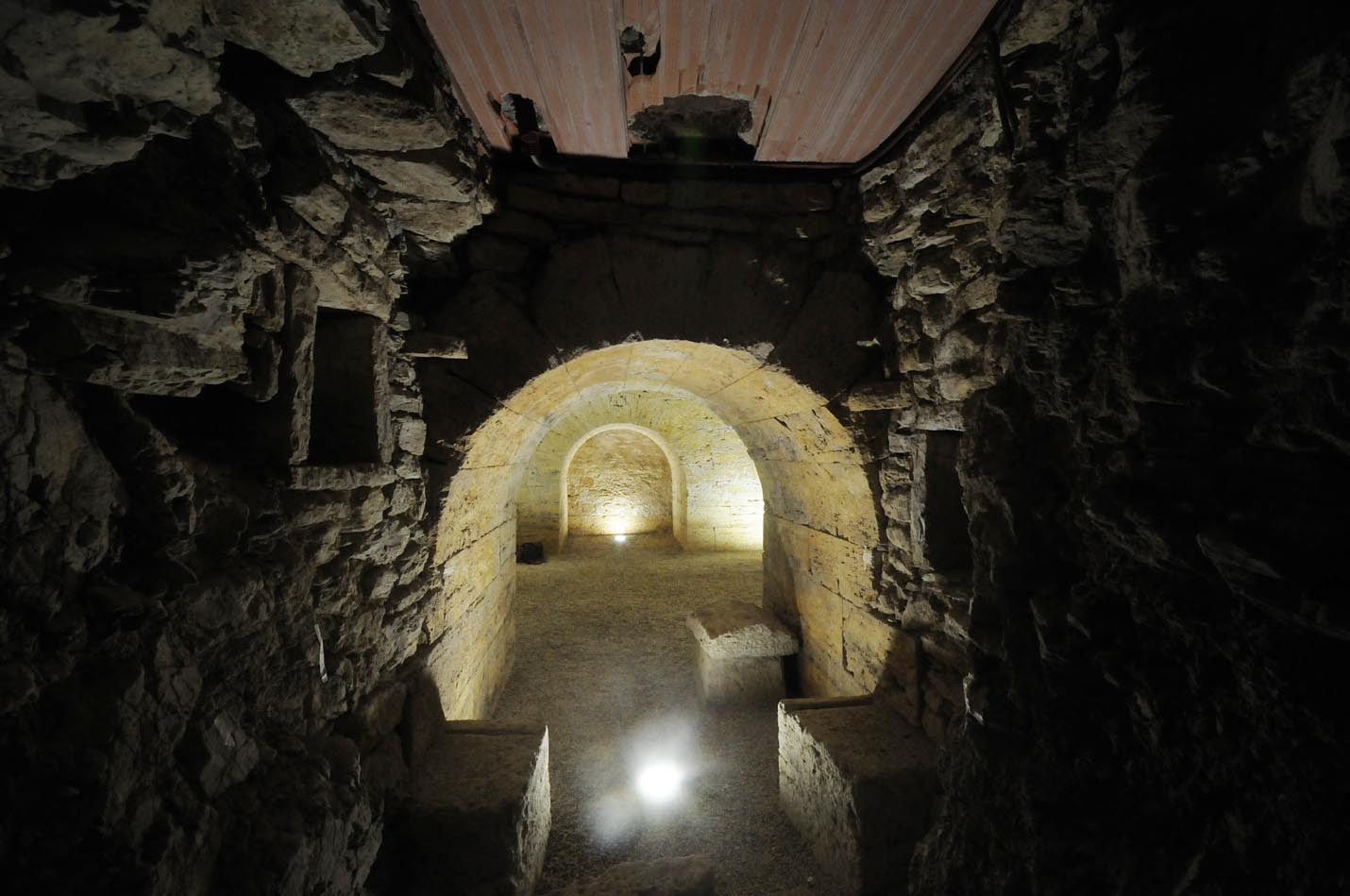 interno della cella di sinistra con banchine per la deposizione delle urne cinerarie